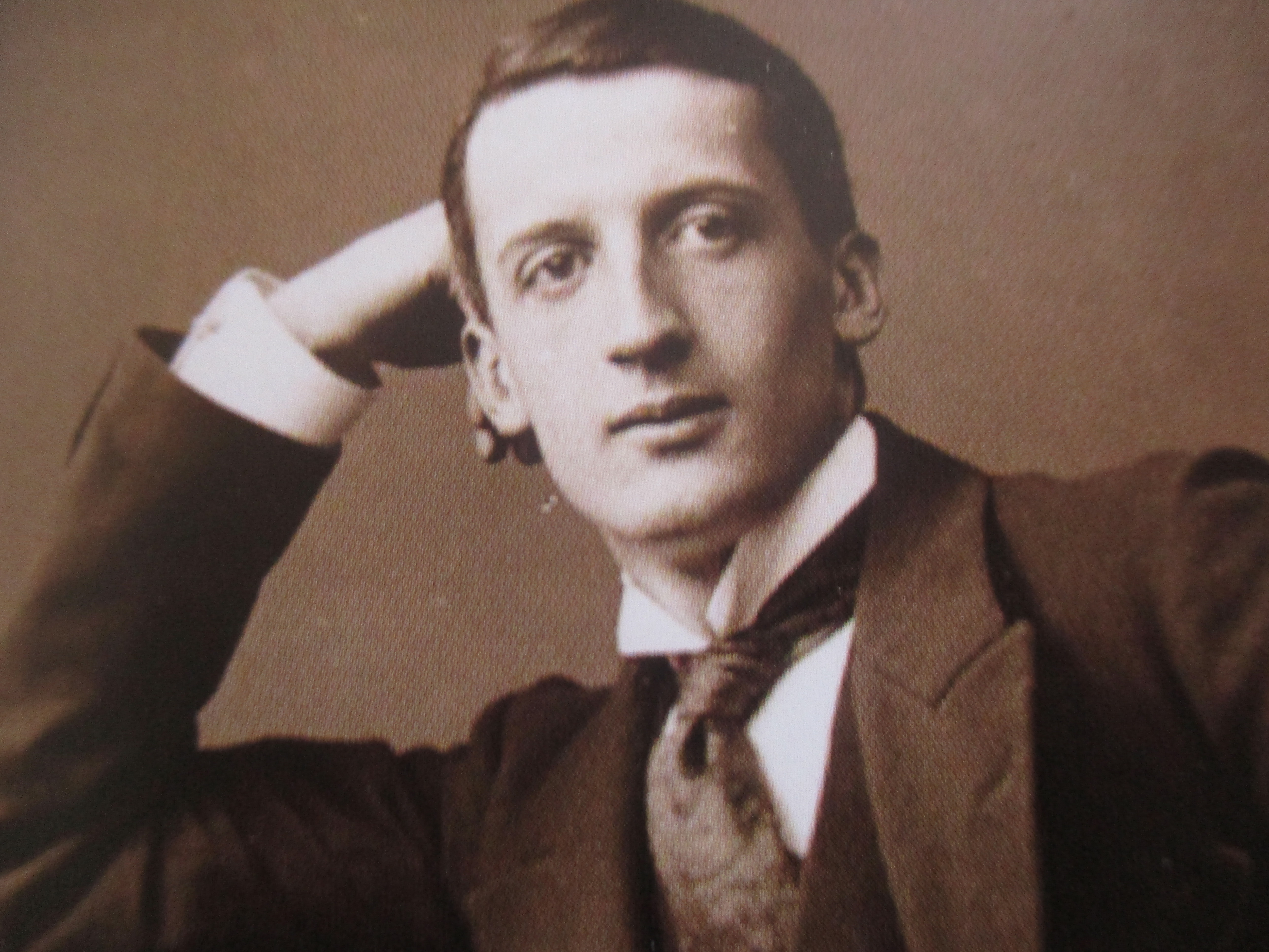 Roffredo Caetani, rpince de Bassiano, vers 1900.